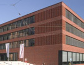 Hauptbibliothek UZH MBC